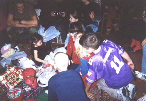 Contents 1 Priskribo 2 Summary 3 Priskribo 4 Licensing Priskribo Infanoj ĝuegas malfermi donacojn. Jen foto pri la ĥaoso en mia familio je Kristnasko 2001. Mi libere fordonas la kopirajton al ĉiu uzemulo.